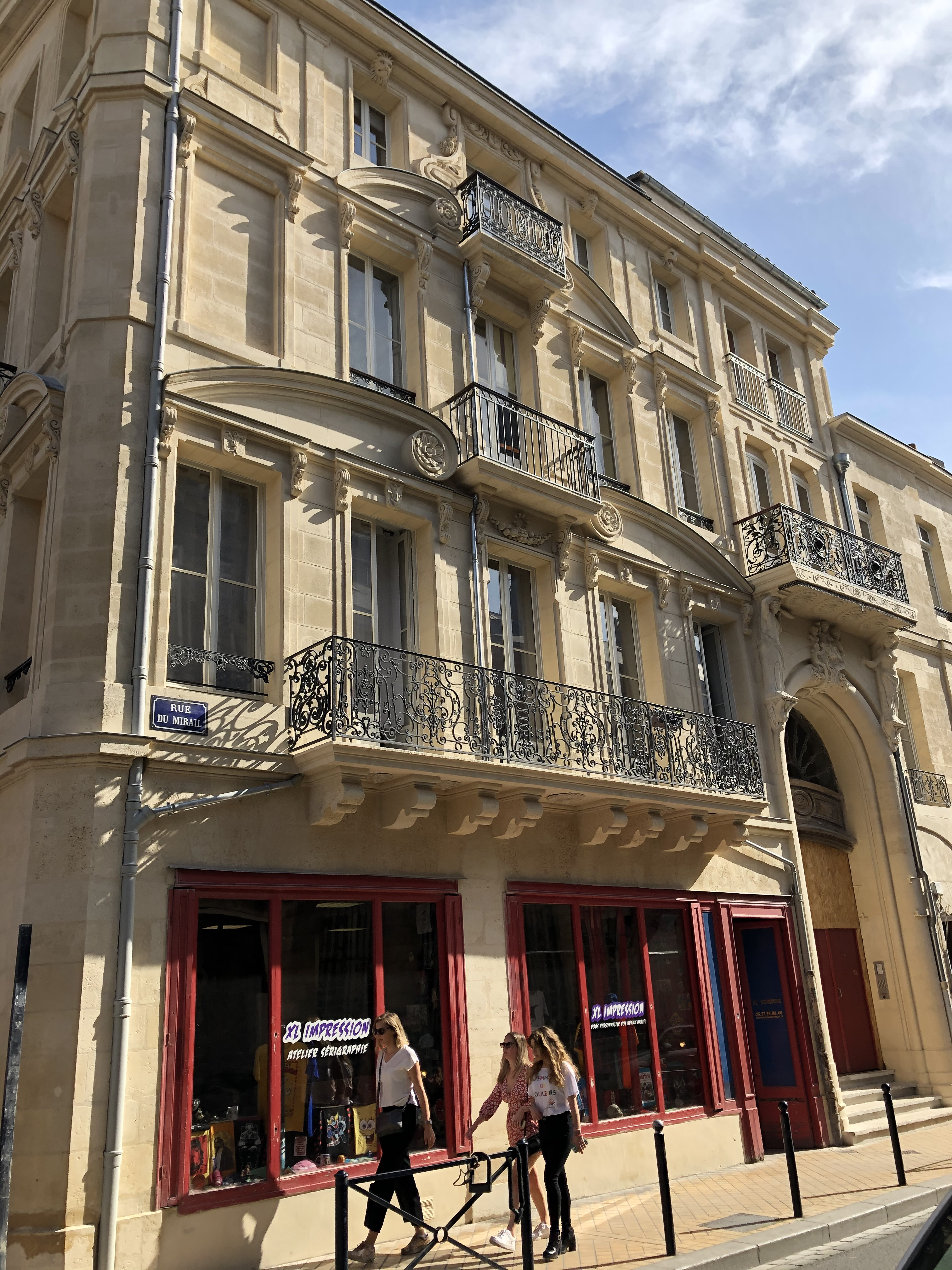 Hôtel Saint-François à Bordeaux, après restauration (façade ouest)